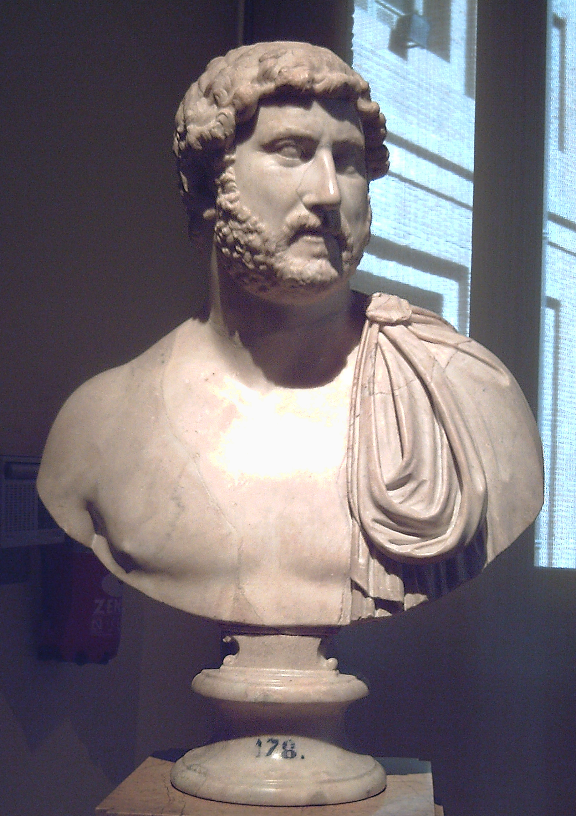 Hadrian